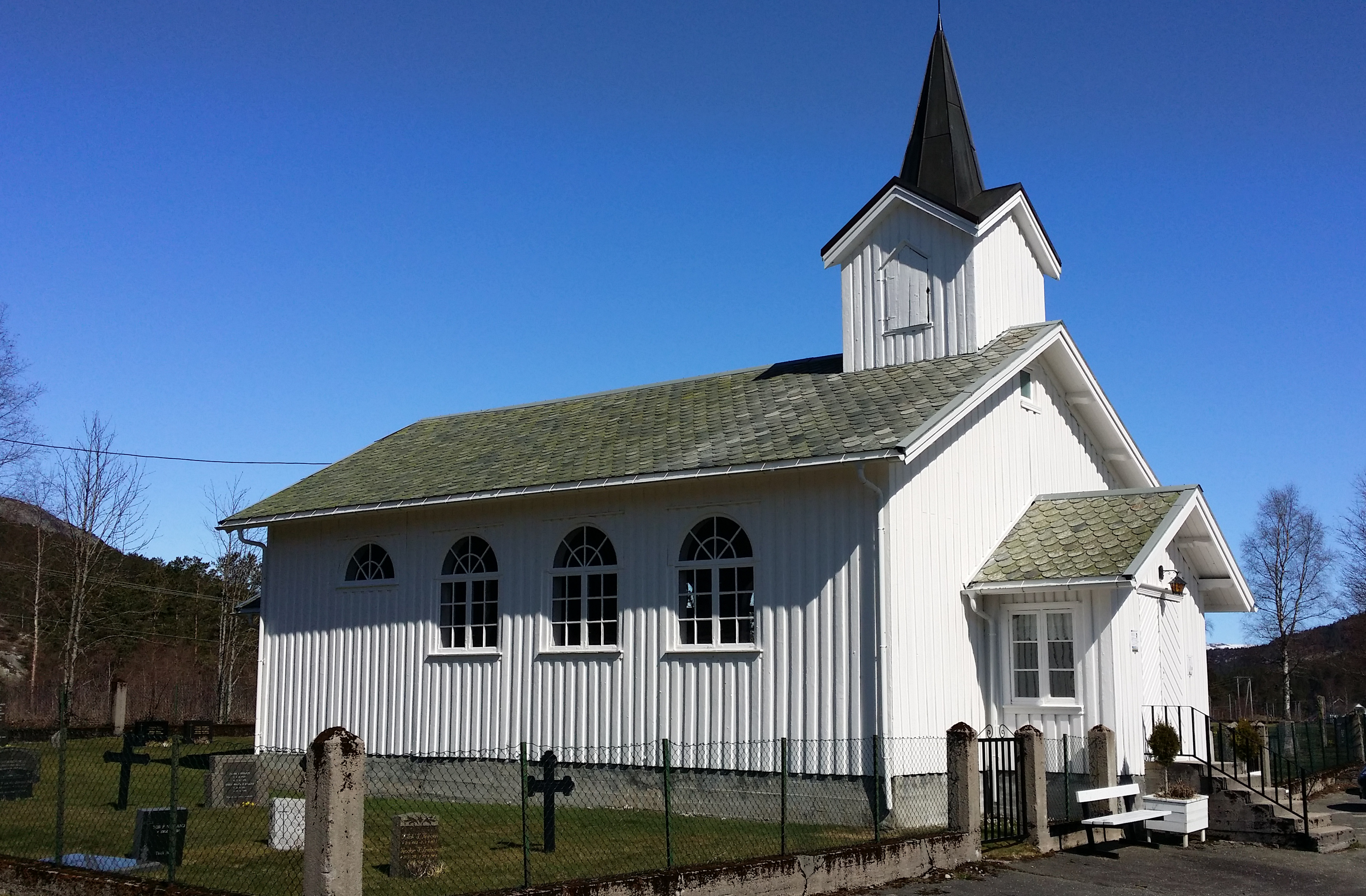 Netlandsnes kapell april 2014